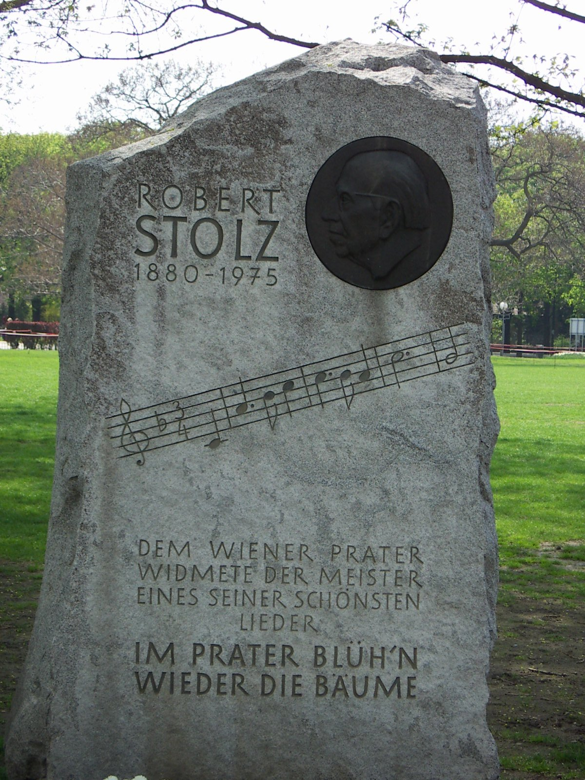 Robert Stolz Memorial at the Wiener Prater / Robert Stolz Denkmal im Wiener Prater